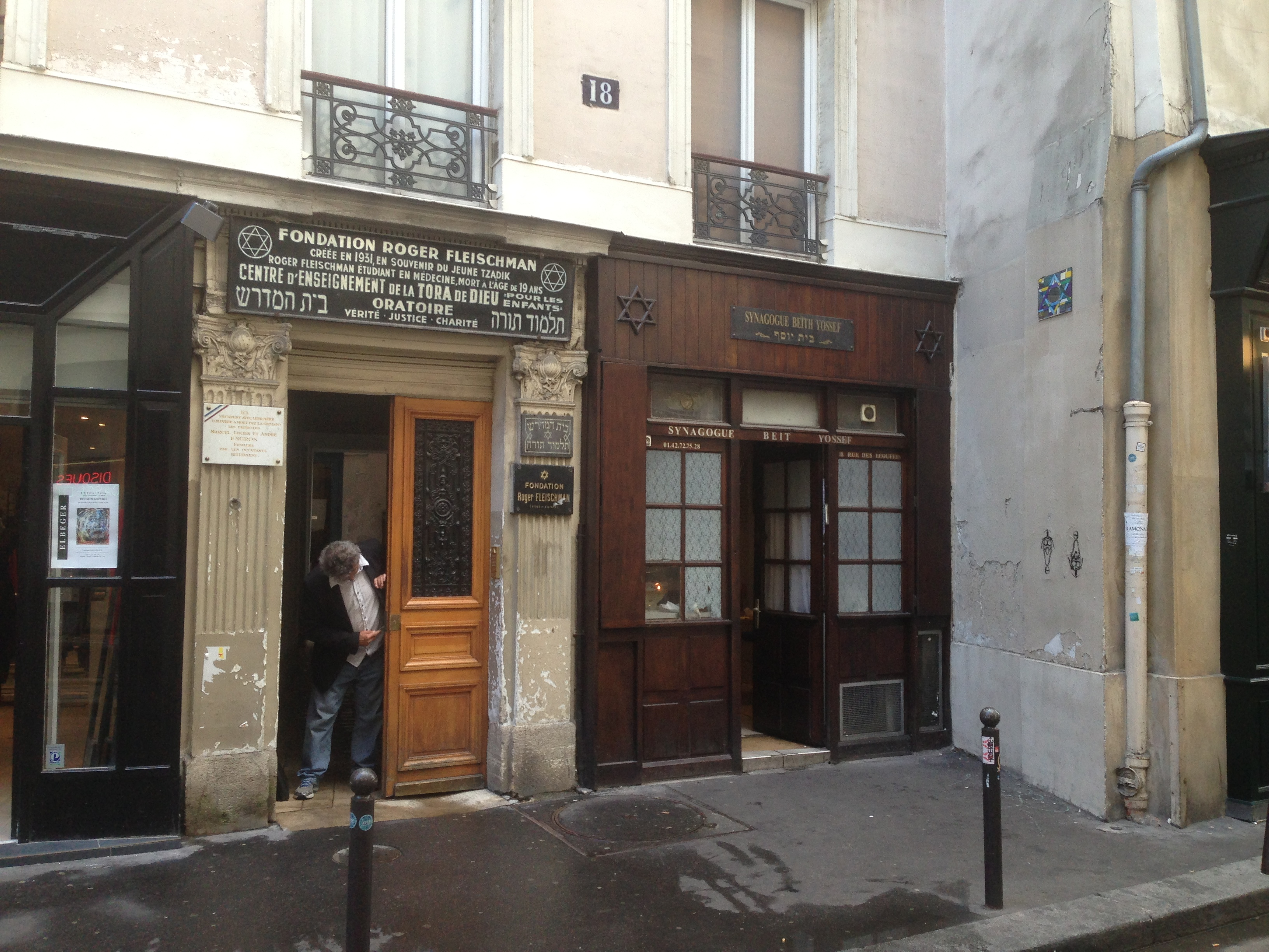 Le Marais, Parizo, Francio.